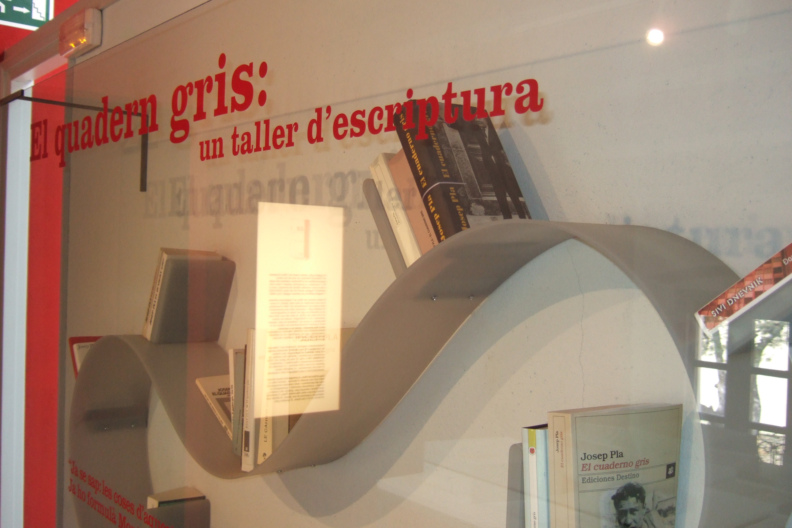 Exposició permanent de la Fundació Josep Pla: Josep Pla (1897 – 1981). Secció sobre El quadern gris